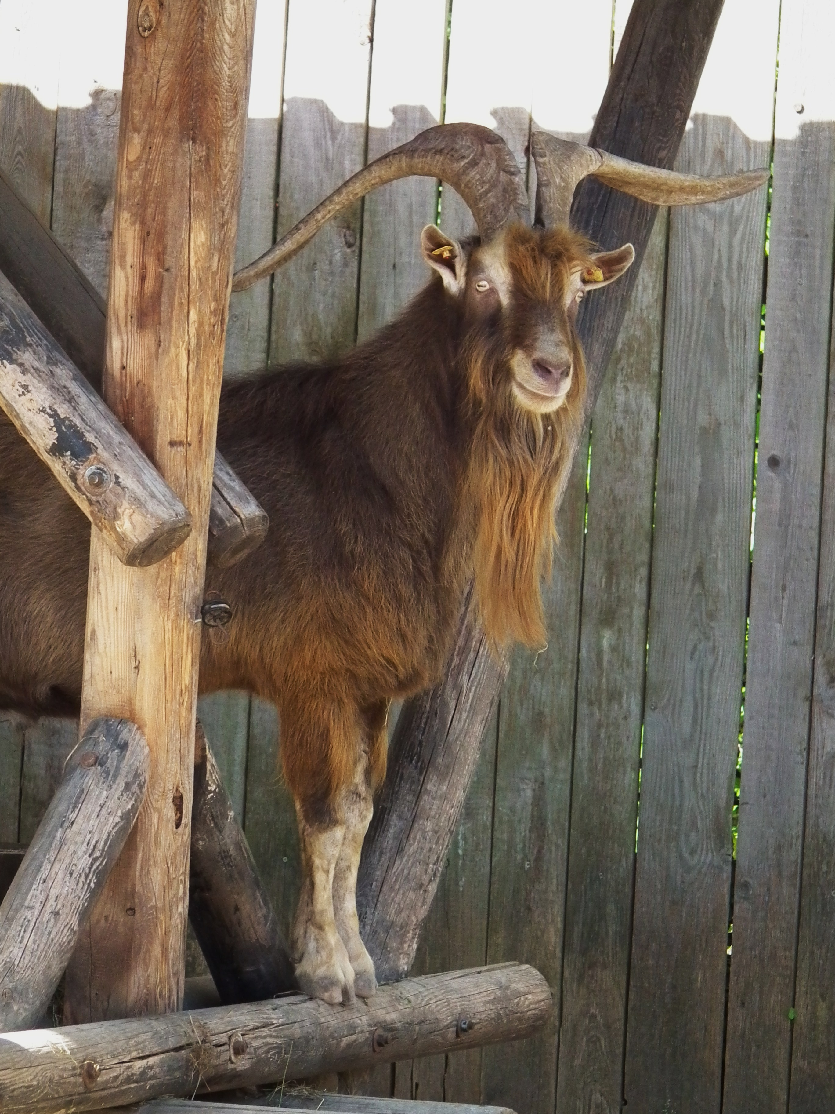 Thüringer Waldziege im Tiergarten Worms (Rheinland-Pfalz, Deutschland)